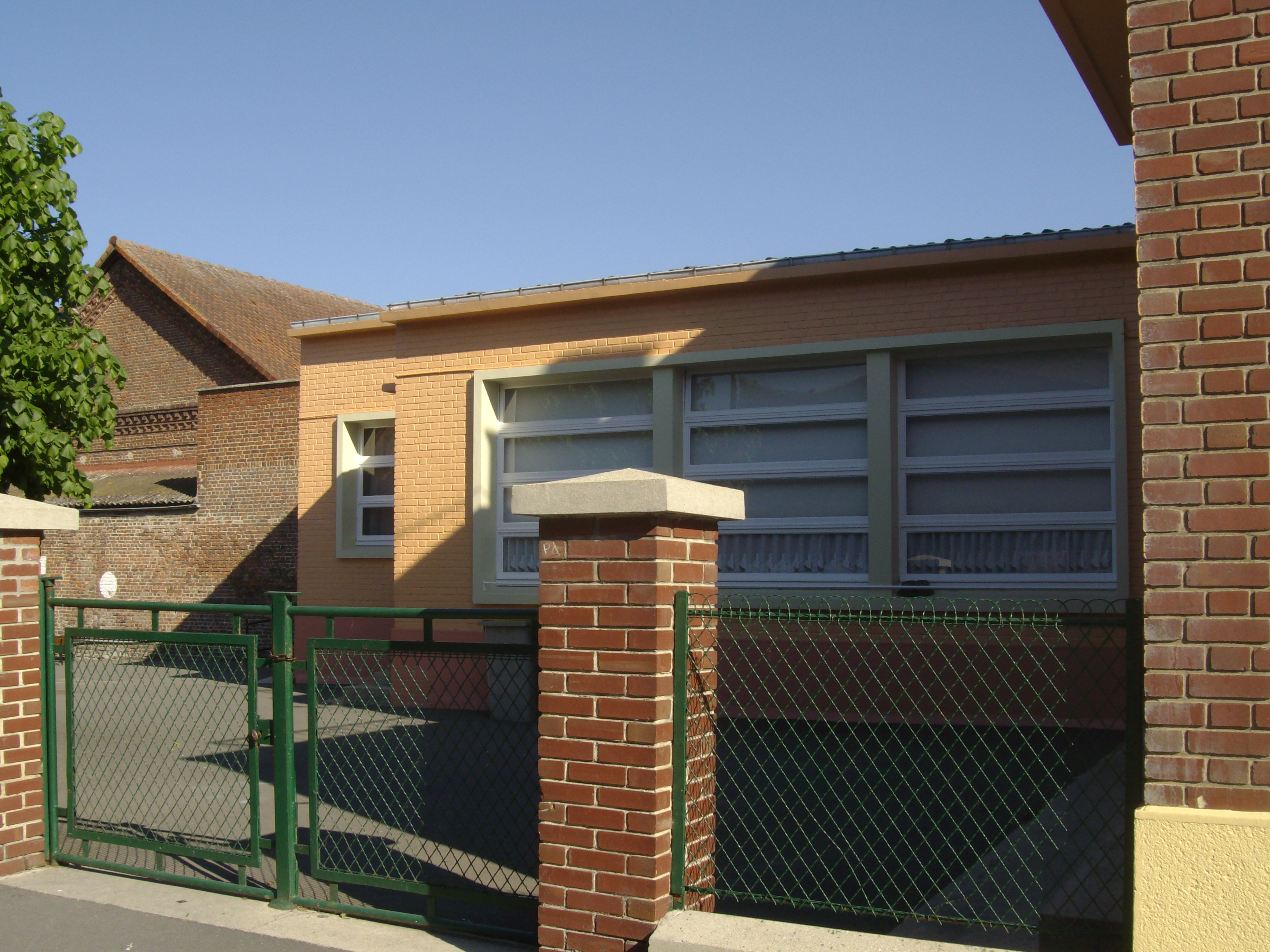 École Maternelle du village